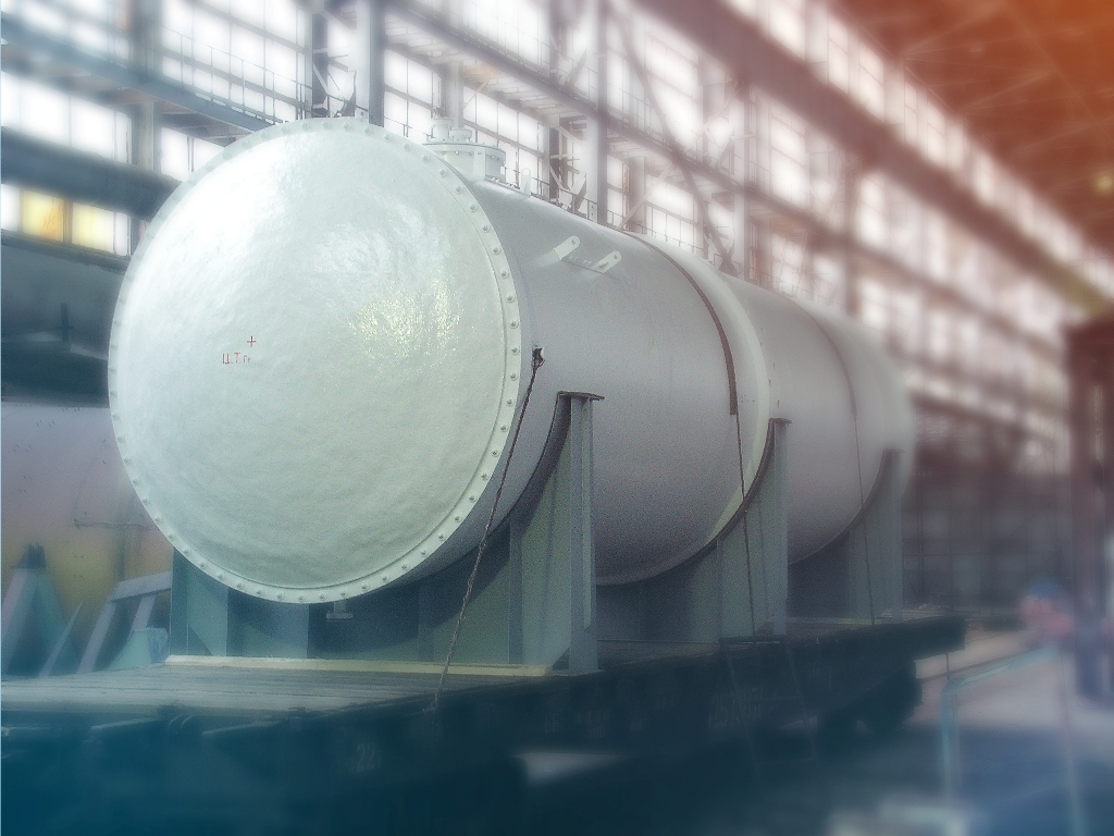 Емкости из стеклопластика для хранения и транспортирования различных агрессивных жидкостей, технической и питьевой воды